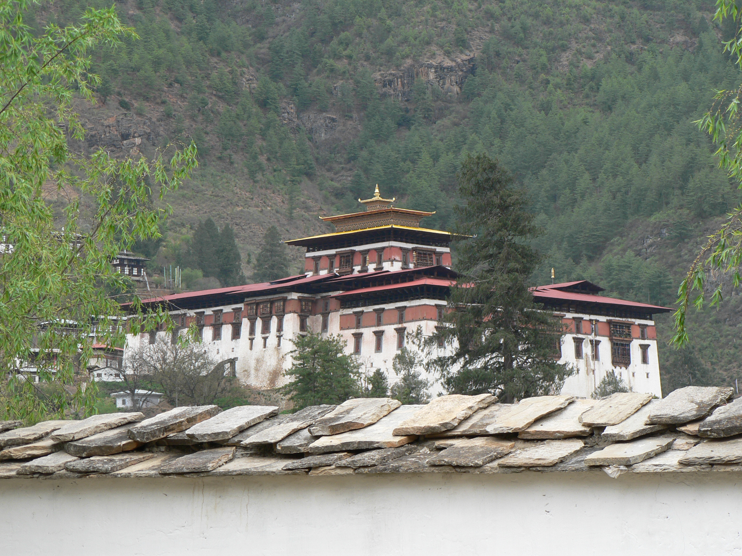 Rinpung Dzong, Paro Bhutan